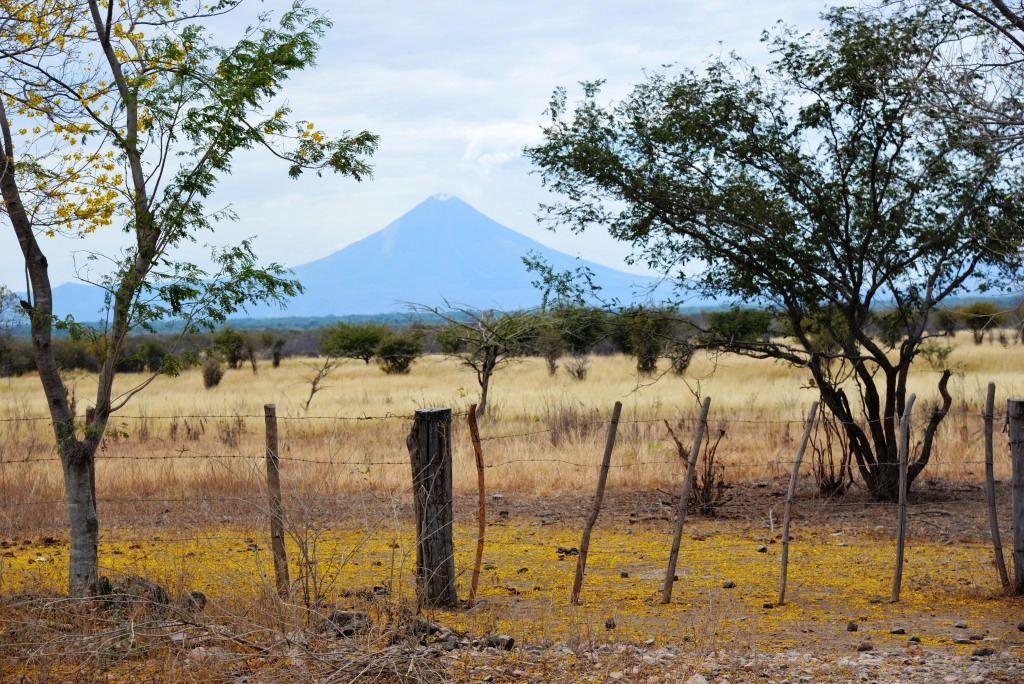 El campo del municipio de San Francisco Libre con una vista del volcán Momotombo.